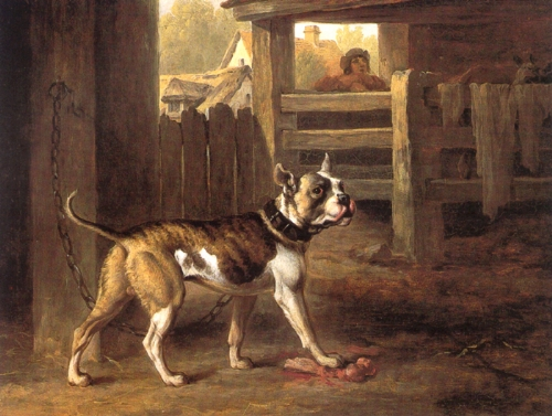 Bulldog